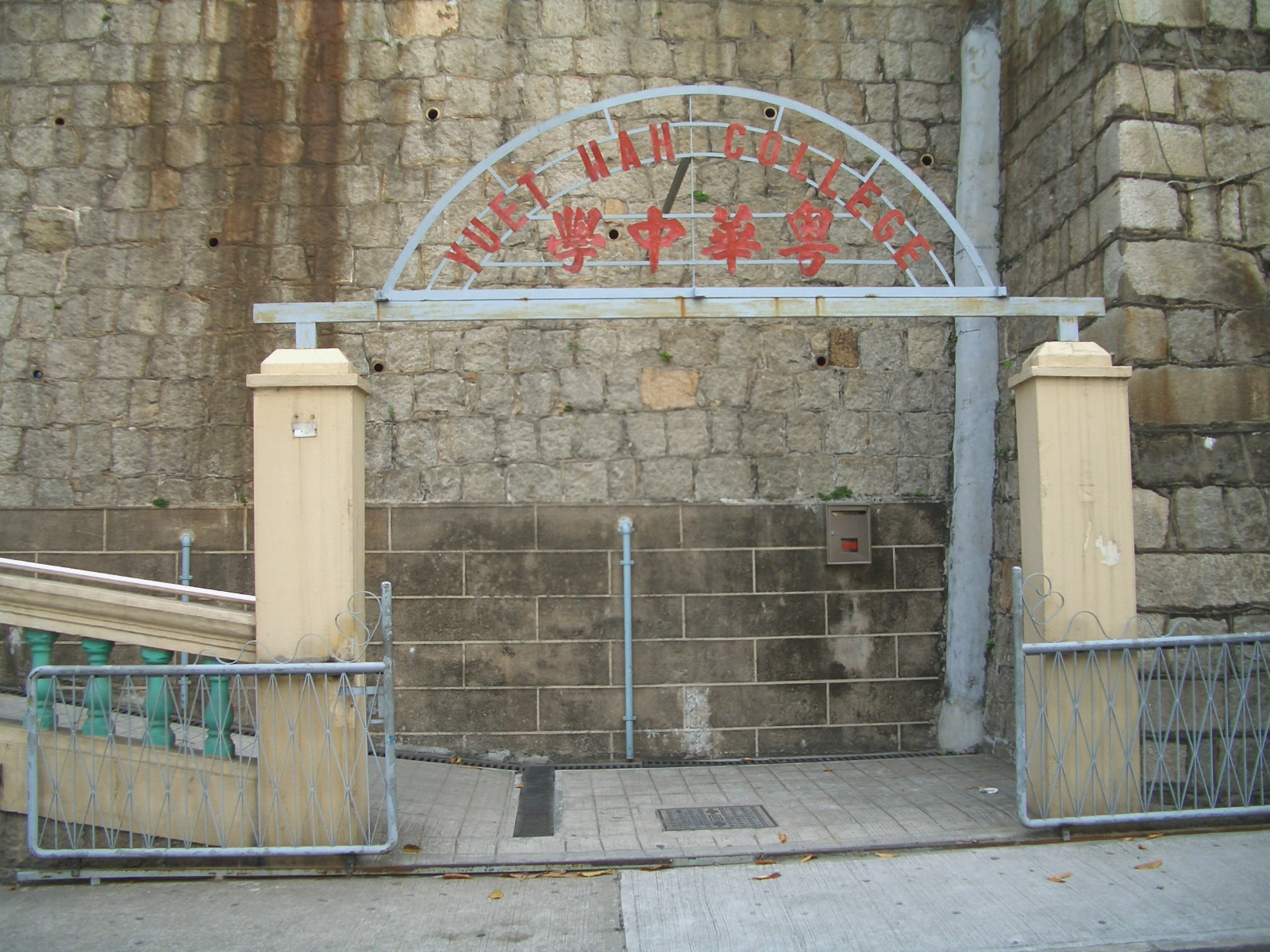 粵華中學的校門。